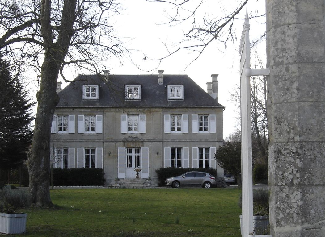 château du XVIIIè siècle dont le fronton central en pierre inclus dans la toiture a été détruit en juin1944